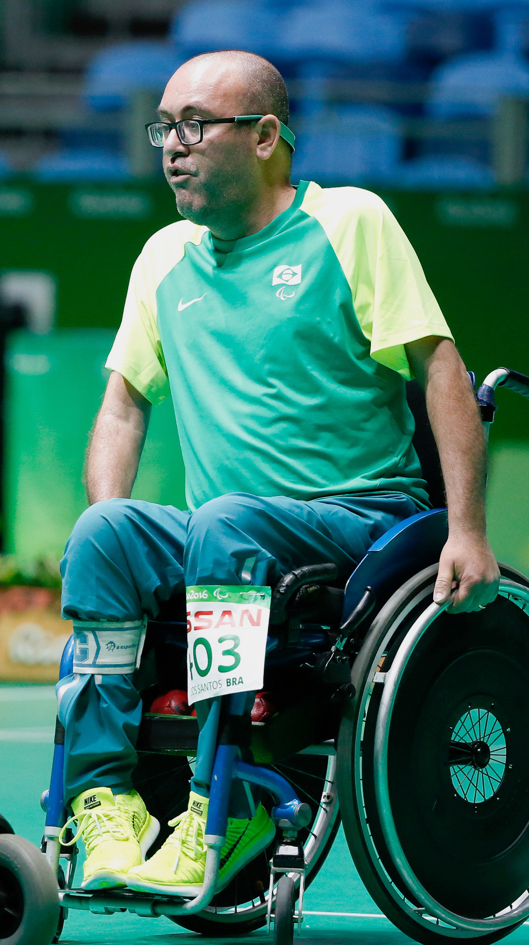 Rio de Janeiro - Brasileiros ficam com medalha de prata após derrota para Eslováquia na final da bocha BC4 nos Jogos Paralímpicos Rio 2016 (Fernando Frazão/Agência Brasil)